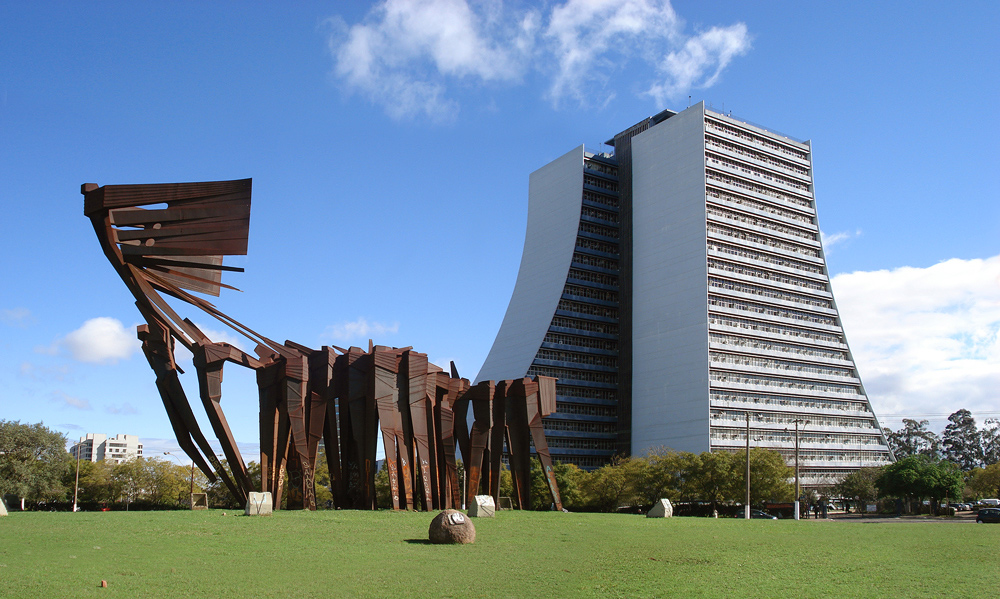 Largo dos Açorianos, vendo-se o Centro Administrativo do Estado e o Monumento aos Açorianos em primeiro plano. Porto Alegre, Brasil.